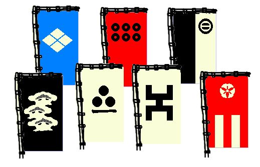 Eigen tekening naar [1] op Wikicommons. Een GNU afbeelding. Ik was niet erg enthousiast over die tekening omdat niet duidelijk was dat het om vlaggen ging. Robert Prummel Maart 2007